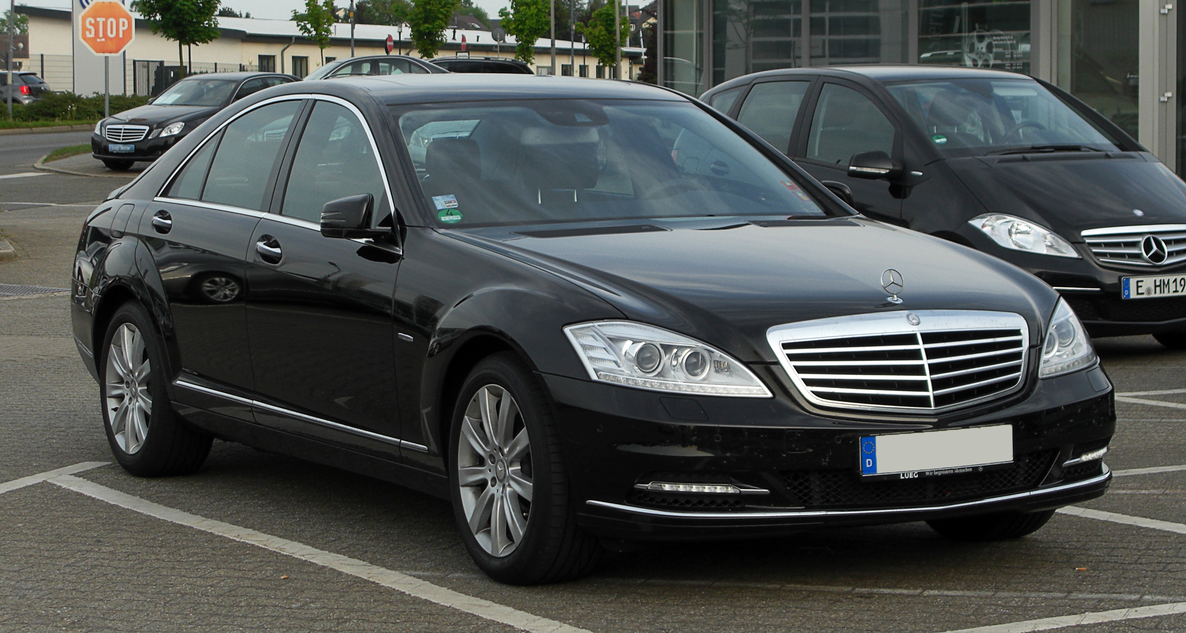 Mercedes-Benz S 350 CDI BlueEFFICIENCY 4MATIC (W 221, Facelift)